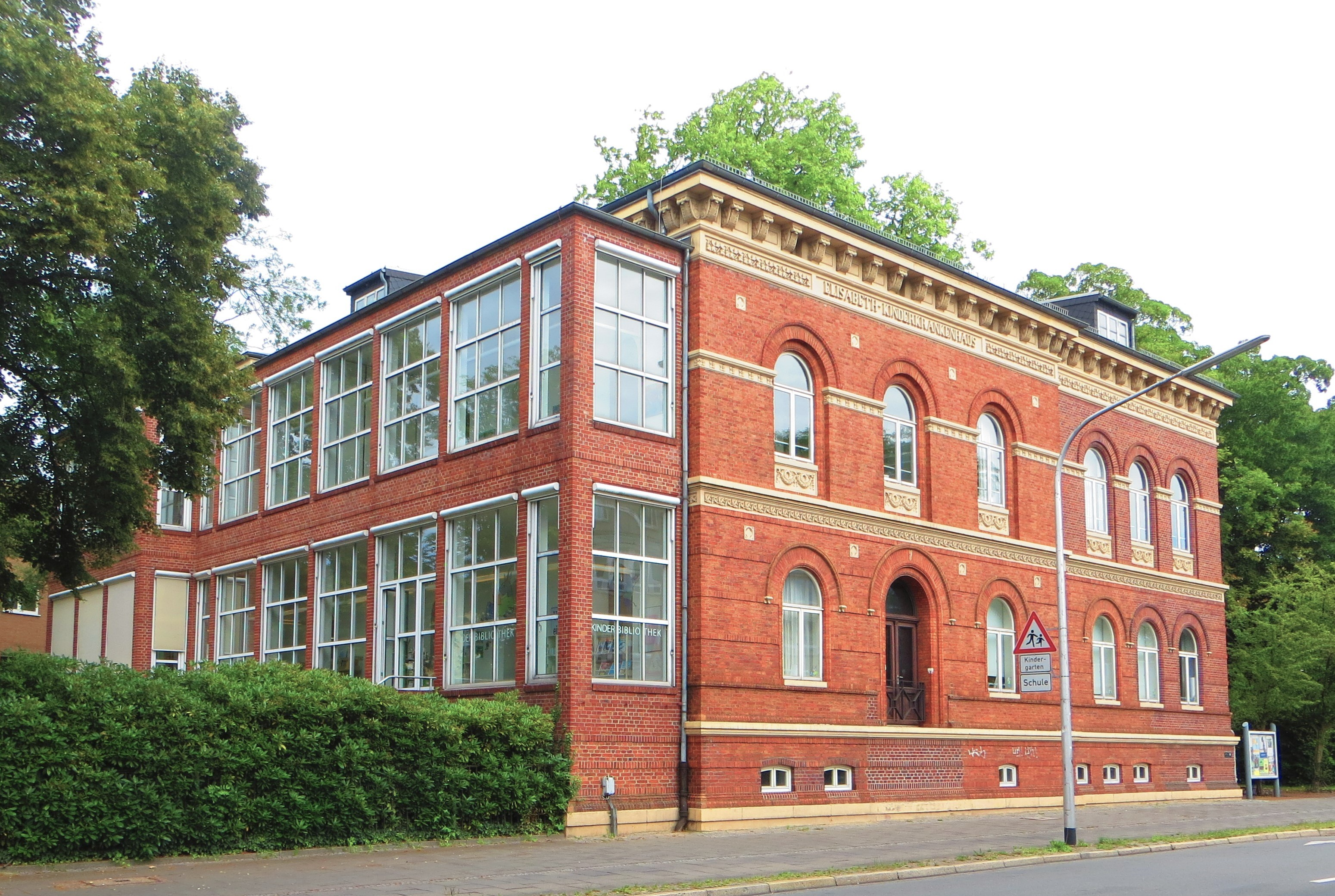 Ehemaliges Krankenhaus, erbaut im 19. Jahrhundert